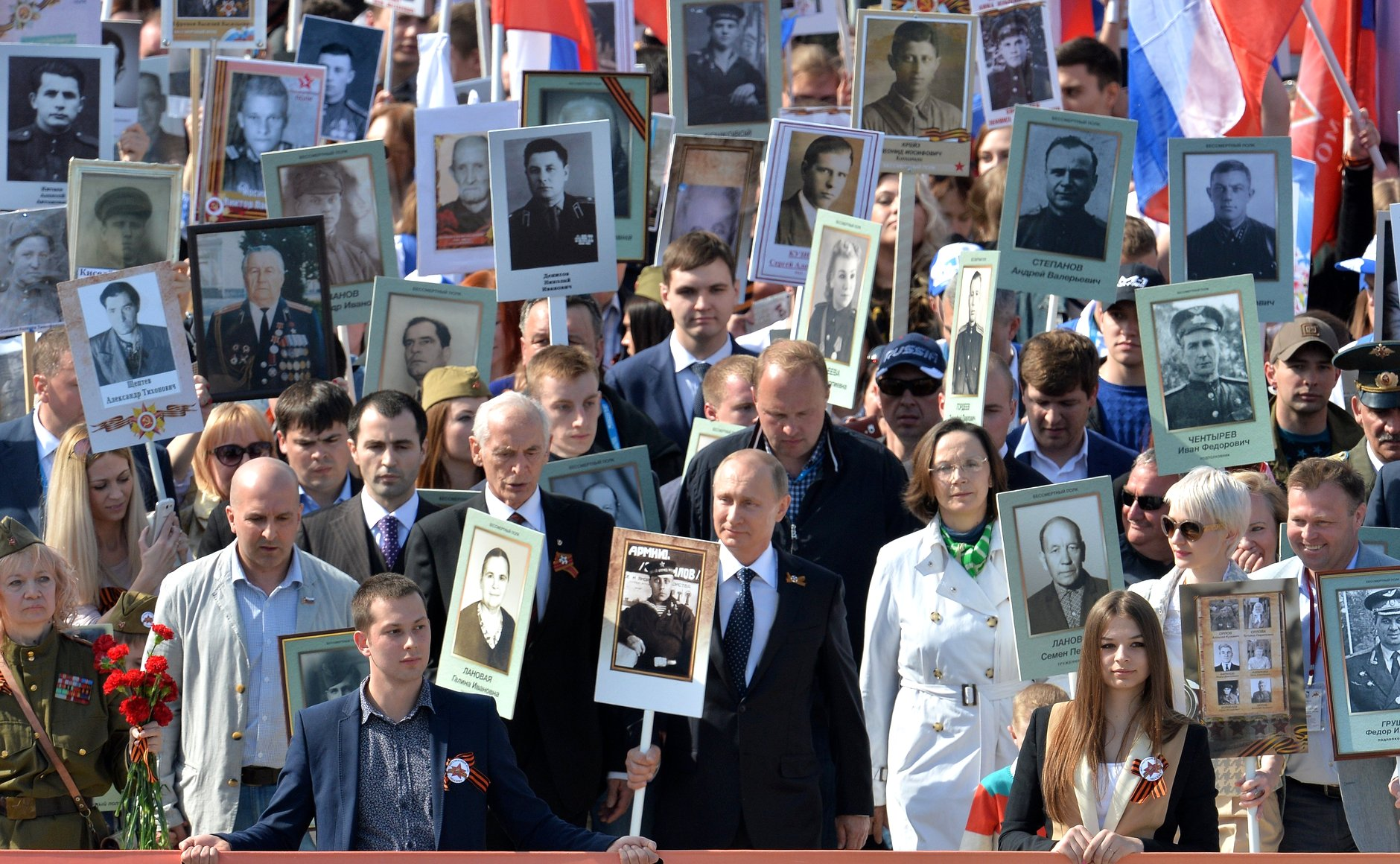 Шествие региональной патриотической общественной организации «Бессмертный полк» В День Победы Владимир Путин принял участие в акции «Бессмертный полк». Глава государства с портретом своего отца-фронтовика присоединился к шествию колонны на Красной площади.